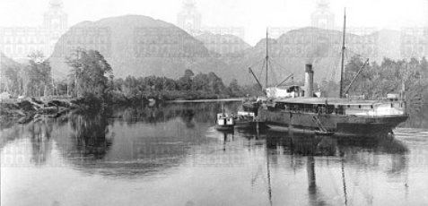 Der Dampfer "Lircay" im Hafen von Puerto Aisén, Blick von Nordosten, 1914.